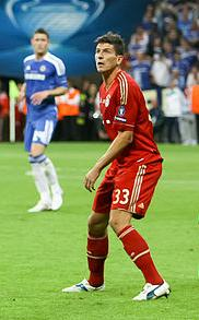 RA1_6061